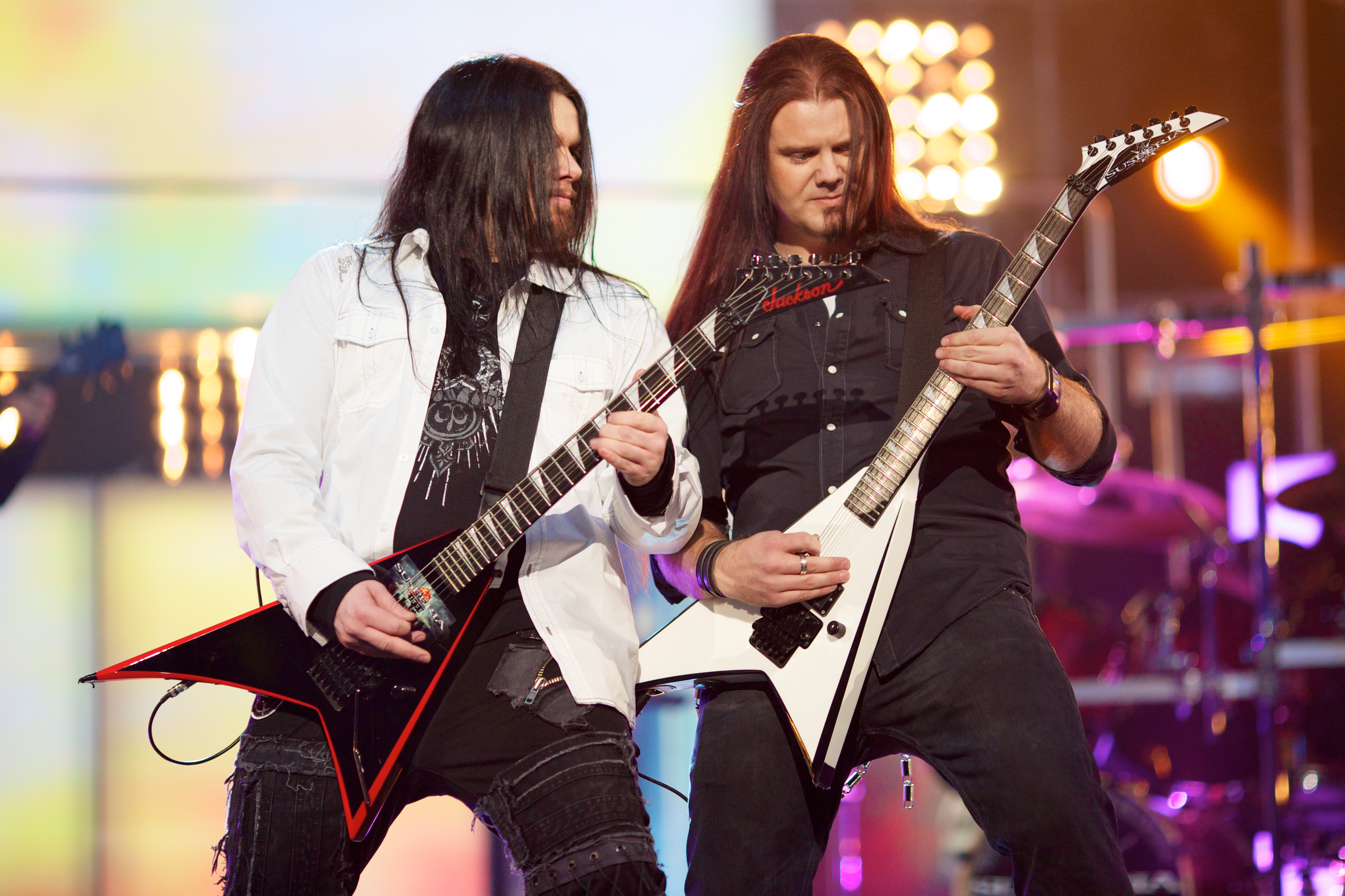 Los guitarristas de la banda noruega Susperia, Cyrus y Elvorn.